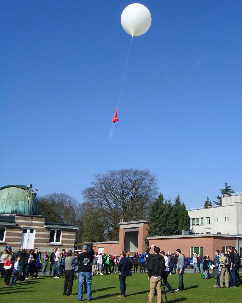 de lancering van de ASGARD ballon in 2012, met op de achtergrond de gebouwen van de Koninklijke sterrenwacht van België en het Koninklijk Meteorologisch Instituut.